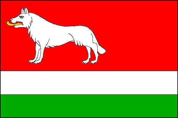 Vlajka obce Lkáň